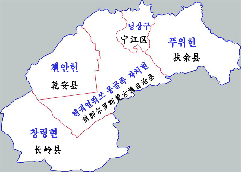 쑹위안시 현급구역도